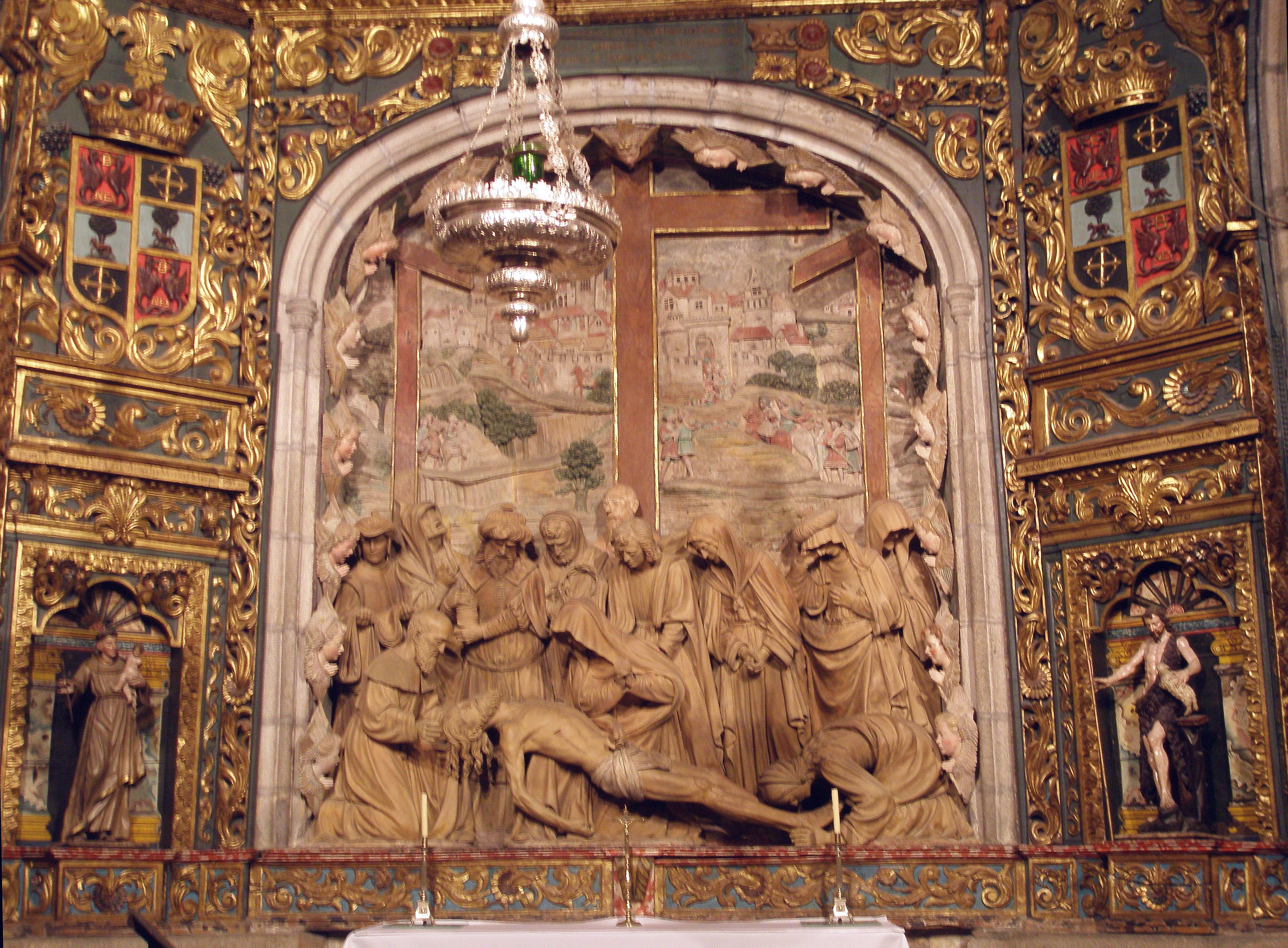 Grupo escultórico llamado "Llanto ante Cristo Muerto". Capilla de Mondragón de la Catedral de Santiago de Compostela